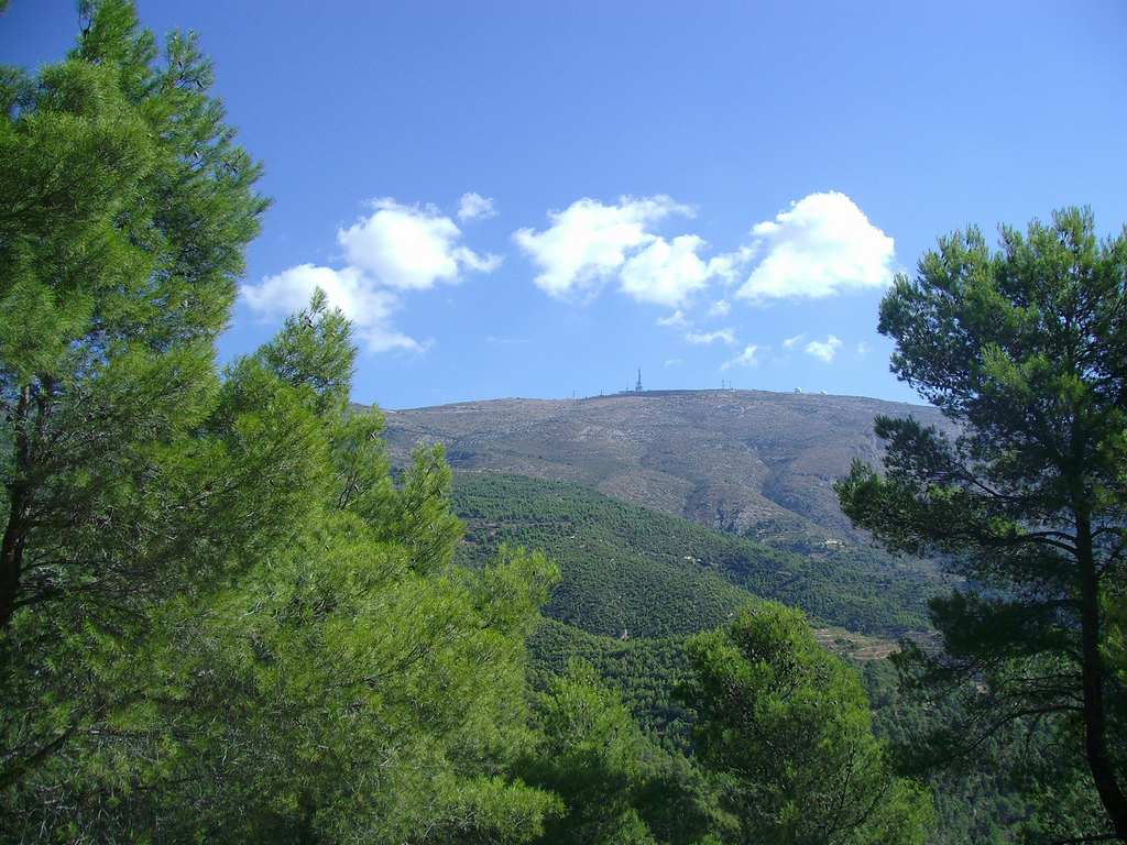 Vista de la cima de Aitana. Las antenas que se pueden observar son las del EVA.